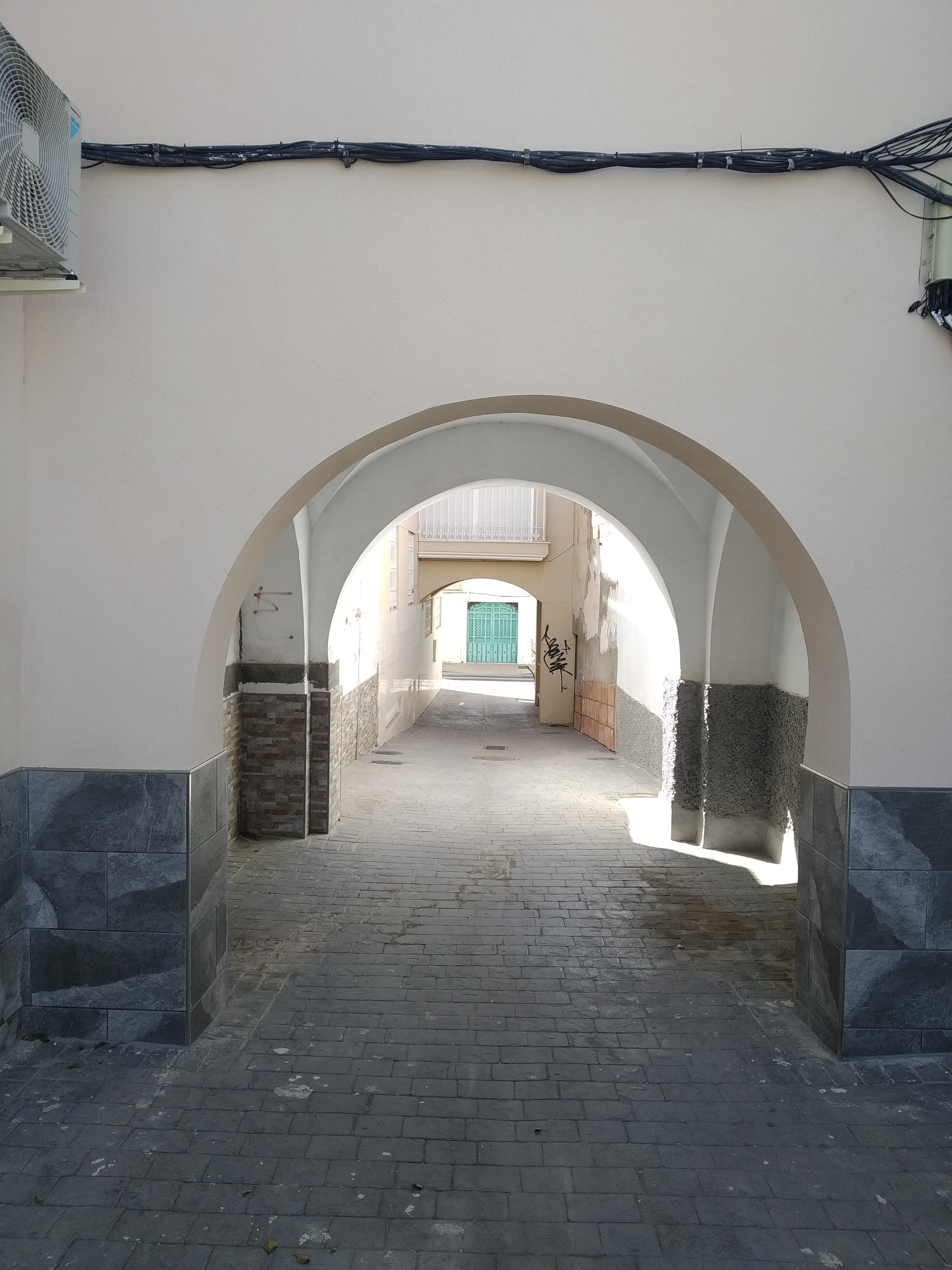 Uno de los cuatro arcos que hay a la entrada del barrio de Regiones